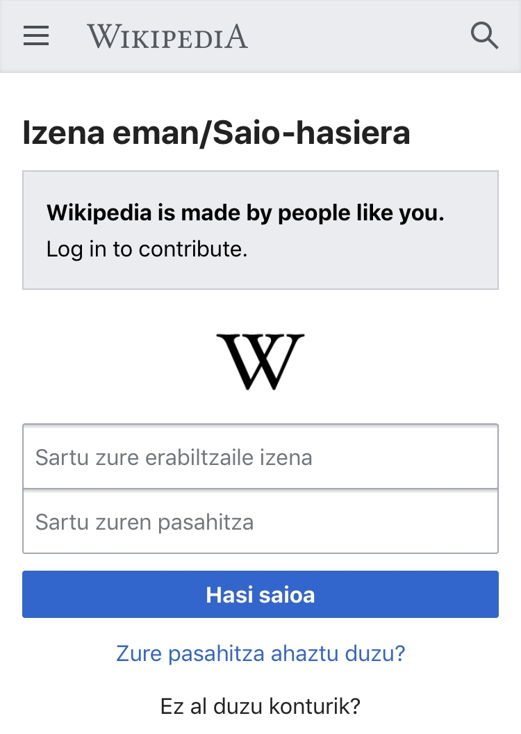 Euskal Wikipedian sartzeko pasahitza eskatzen duen leihoa